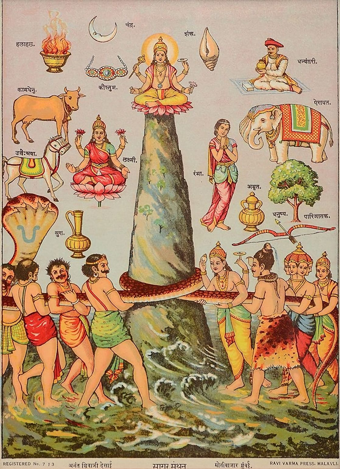 Sagar Manthan